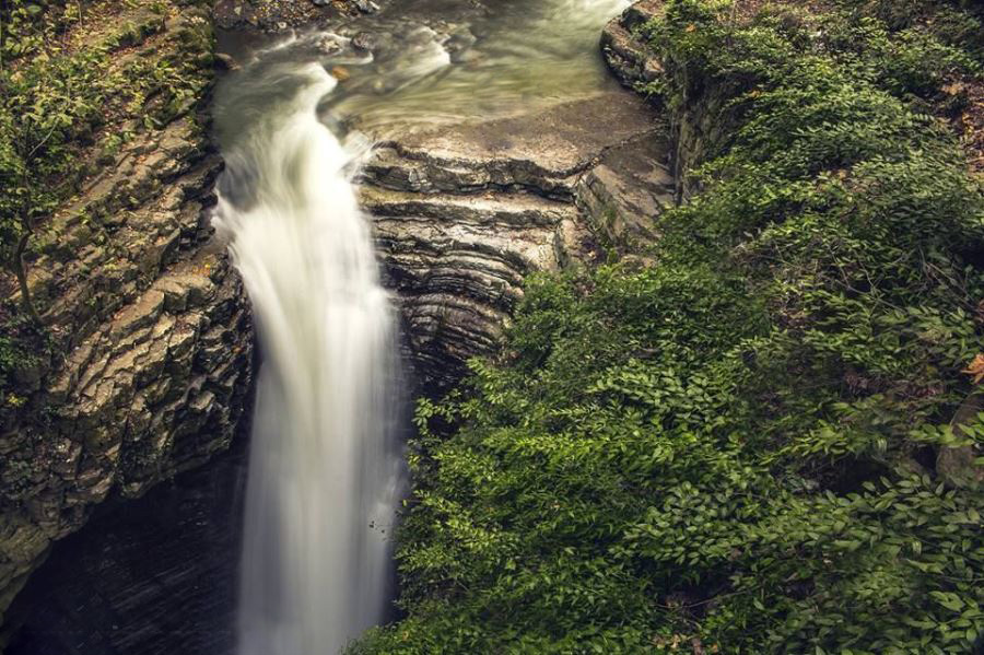 آبشار ویسادار پره سر یکی از زیبا ترین و متفاوت ترین آبشار های گیلان و حتی ایران آبشار ویسادار از زیباترین آبشارهای ایران و سومین آبشار مرتفع استان گیلان است. این آبشار در 16 کیلومتری شهر پره سر در شهرستان رضوانشهر واقع شده و همچون نگینی در دل جنگلهای زیبایی این منطقه می درخشد. ابهت این پدیده طبیعی برای هر بیننده جالب و جذاب است به ویژه وقتی از پایین به این آبشارنگریسته می شود با ابهت و زیبایی صد برابر آبشار ویسادار مواجه می شوی، صدای ریزش آب از ارتفاع حدود 20 متری و نیم دایره ای که آب در دل سنگ و صخره برای رسیدن به دریا ایجاد می کند، دیدنی است. صدای پرندگان و شرشر آب و نور خورشید که از لابه لای شاخ و برگ درختان به زمین می تابد منظره ای فوق العاده به وجود آورده که کم نظیر است. البته زیبایی های این پدیده طبیعی آنقدر زیاد است که نمی توان وصفش کرد و به قولی آبشار ویسادار را باید دید، نه اینکه راجع به آن نوشت.